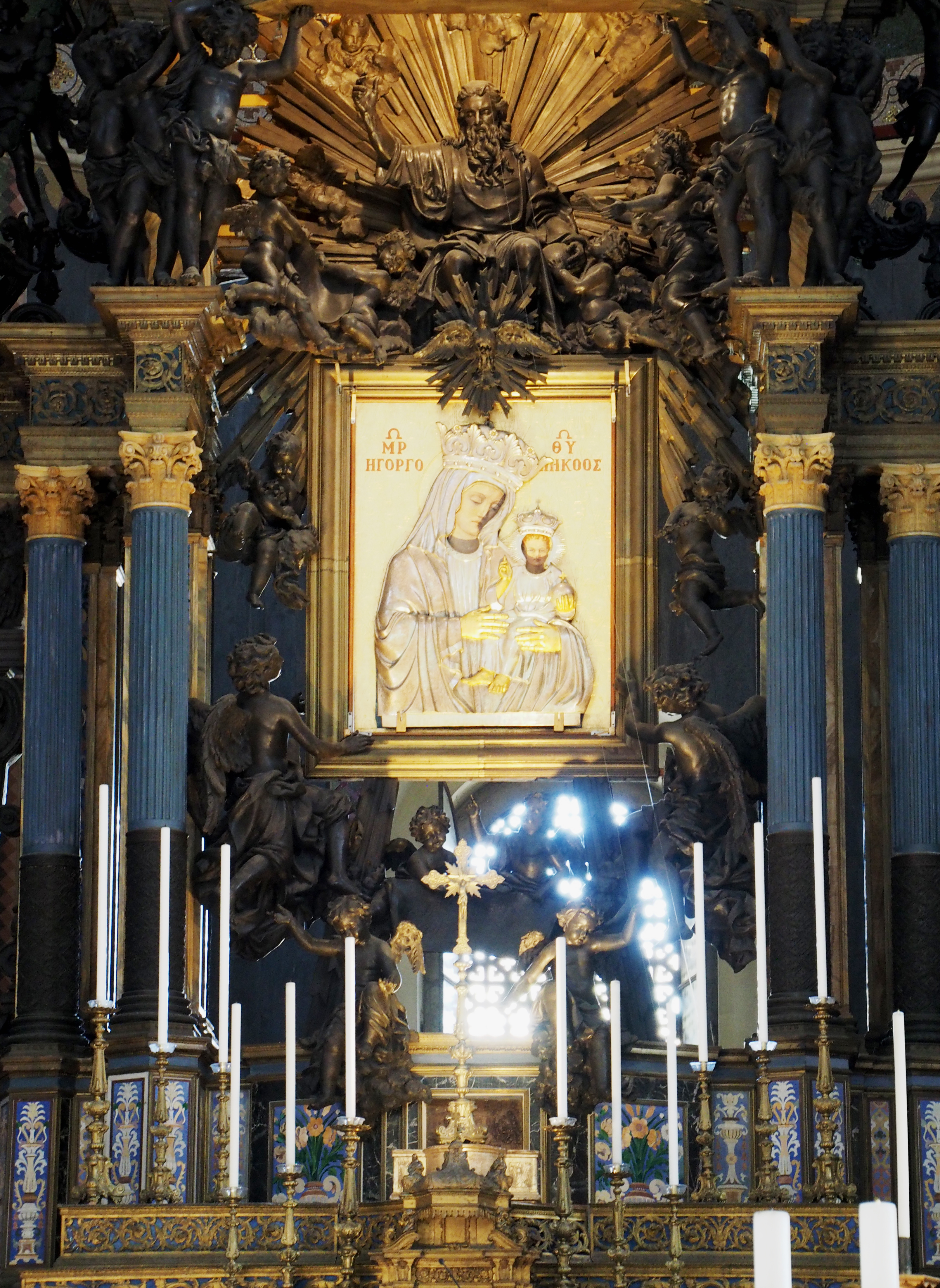 Altar der Kathedrale von Messina